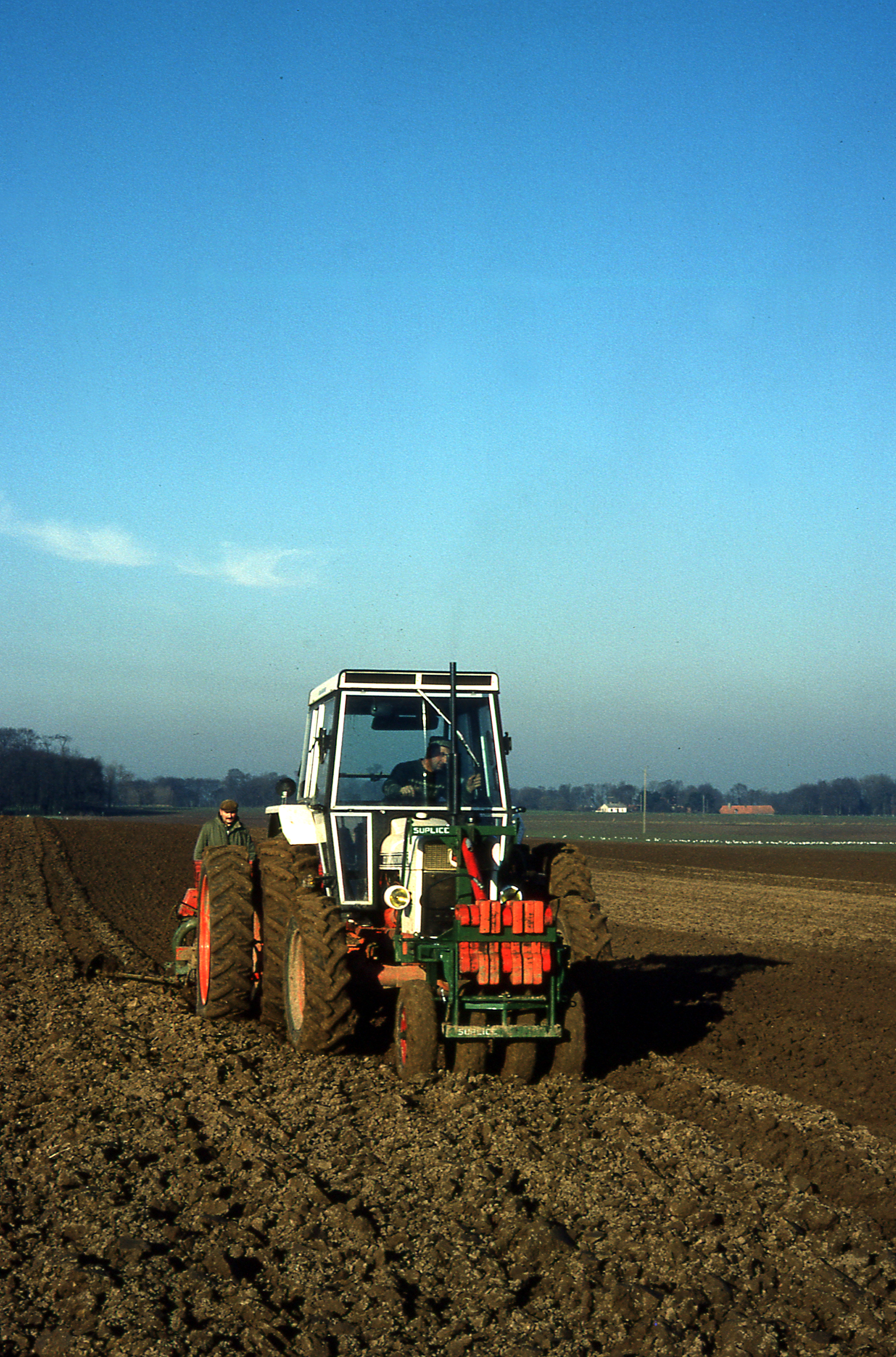 Outil de tassage du sol labouré pour compléter celui effectué par les roues du tracteur.